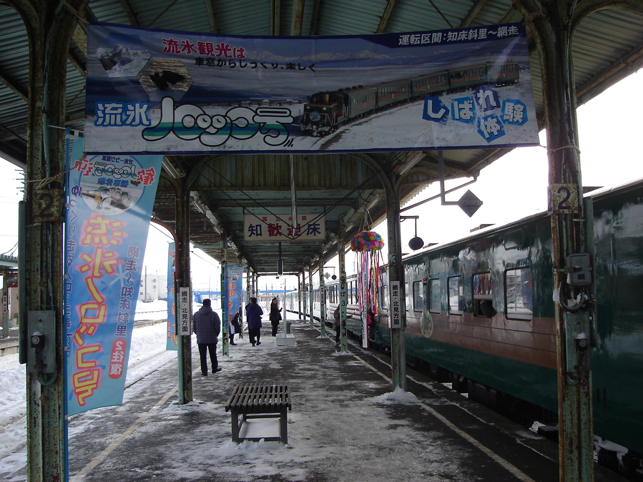 知床斜里駅2・3番のりばと流氷ノロッコ号